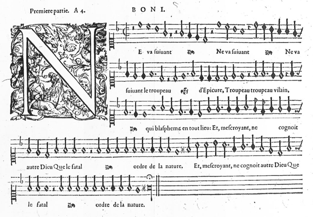 Example of Le Roy et Ballard musical typography in the middle of the XVIth century